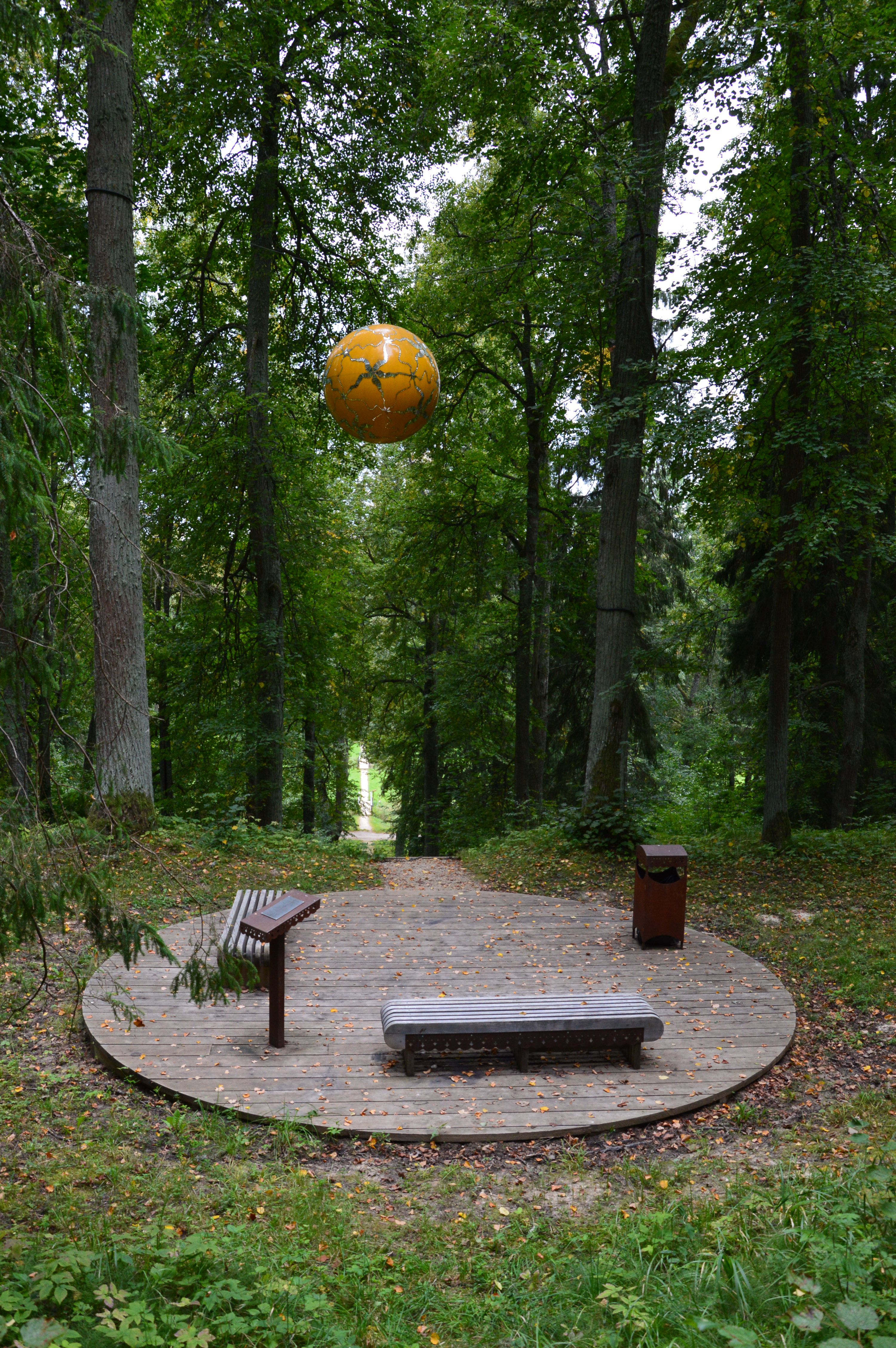 Sänna mõisapargi taevarada